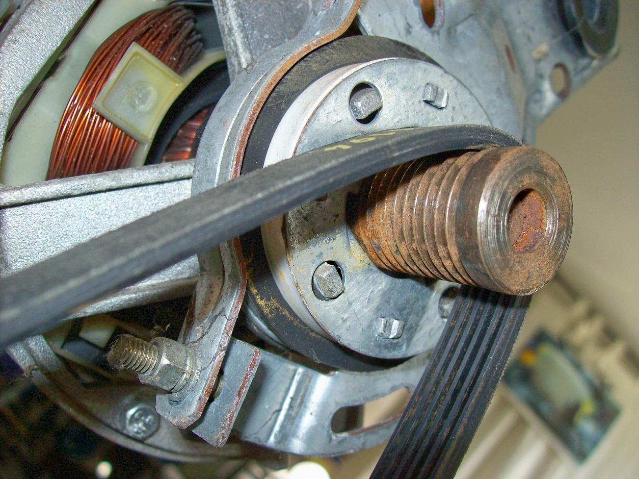 entspannter Keilrippriemen an einer Waschmaschine, Riemenscheibendurchmesser 22,4mm